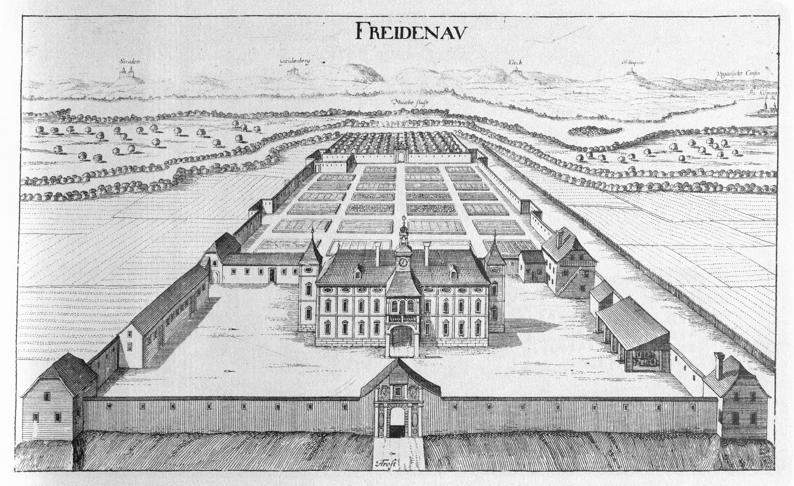 G. M. Vischers Käyserlichen Geographi, Topographia Ducatus Stiriae, Das ist: Eigentliche Delineation / und Abbildung aller Städte / Schlösser / Marcktfleck / Lustgärten / Probsteyen / Stiffter / Clöster und Kirchen / so es sich im Herzogthumb Steyrmarck befinden; Und anjetzo Umb einen billichen Preyß zu finden seynd Bey Johann Bitsch Universitäts Buchhandlern / Auff dem Juden=Platz bey der guldenen Saulen. Graz 1681 Die Nummerierung der Dateien folgt der alphabetischen Reihung der Orte